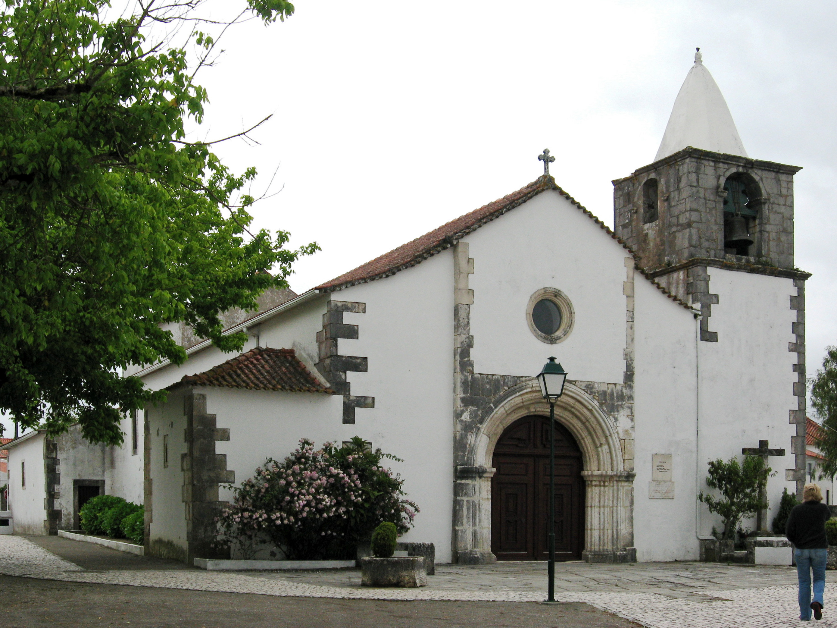 Aljubarrota, Coutos de Alcobaça, church Nossa Senhora de Prazeres, origin 13th century, founded by Mosteiro de Alcobaça